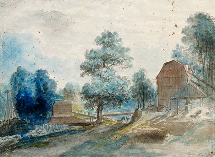 Masugnen i Björndammen. Akvarell av Elias Martin från 1780-90-talet. Bilden är beskuren.